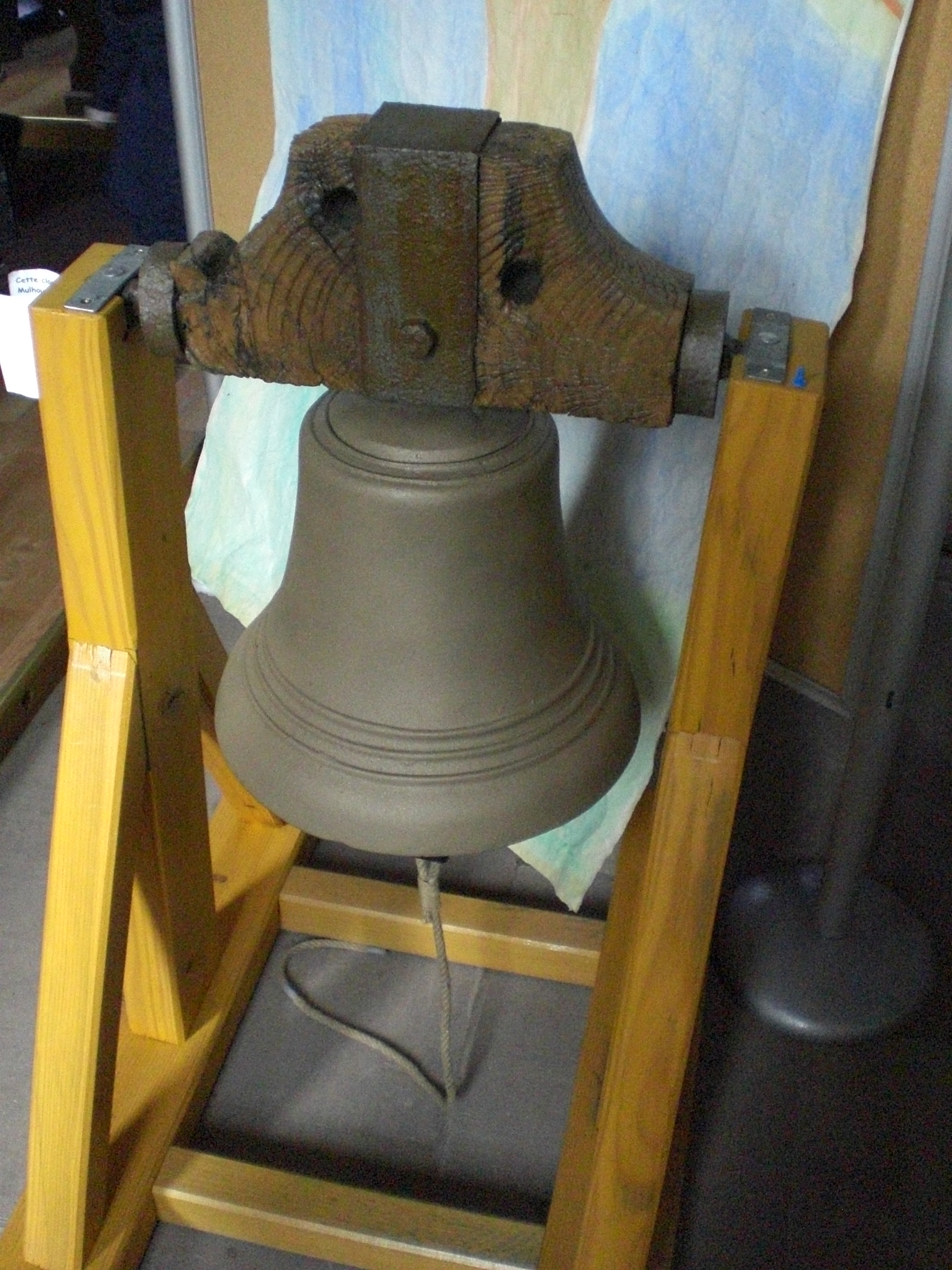 Glocke von 1847 Prot.-Luth. Kirche Forbach 2013